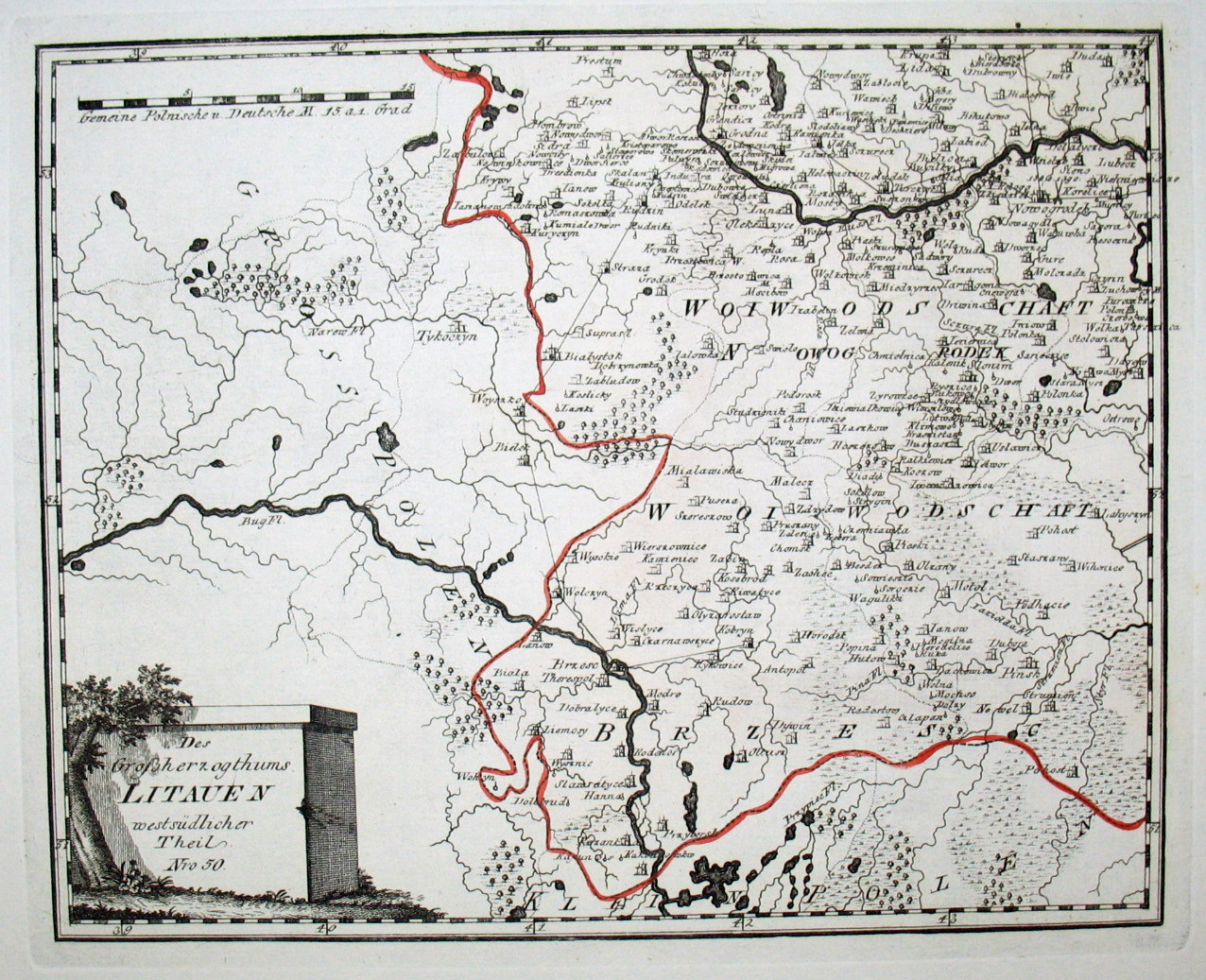 Des Großherzogthums Litauen westsüdlicher Theil. Nro. 50. Kolorierter Kupferstich